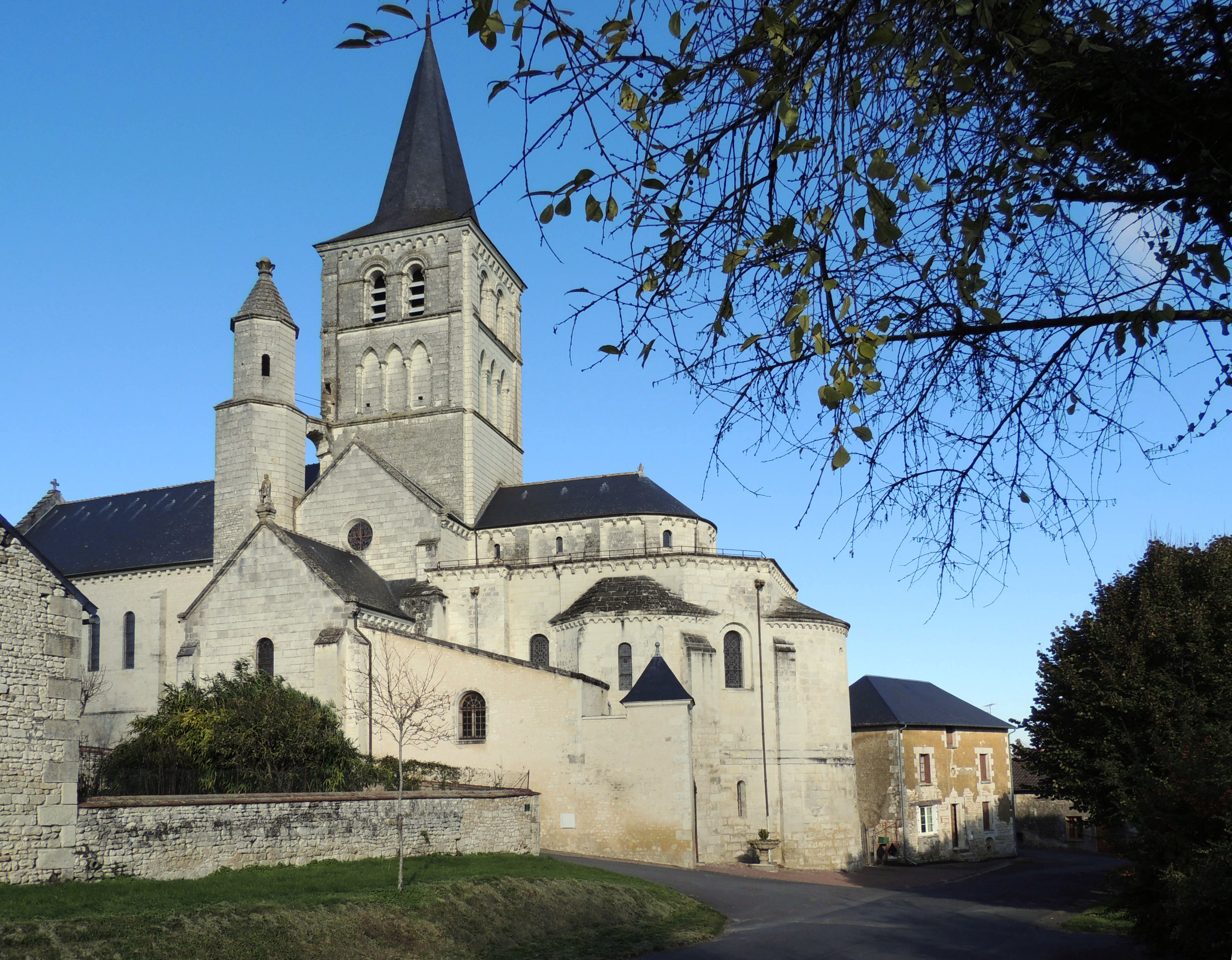 Collégiale Saint-Georges de Faye-la-Vineuse